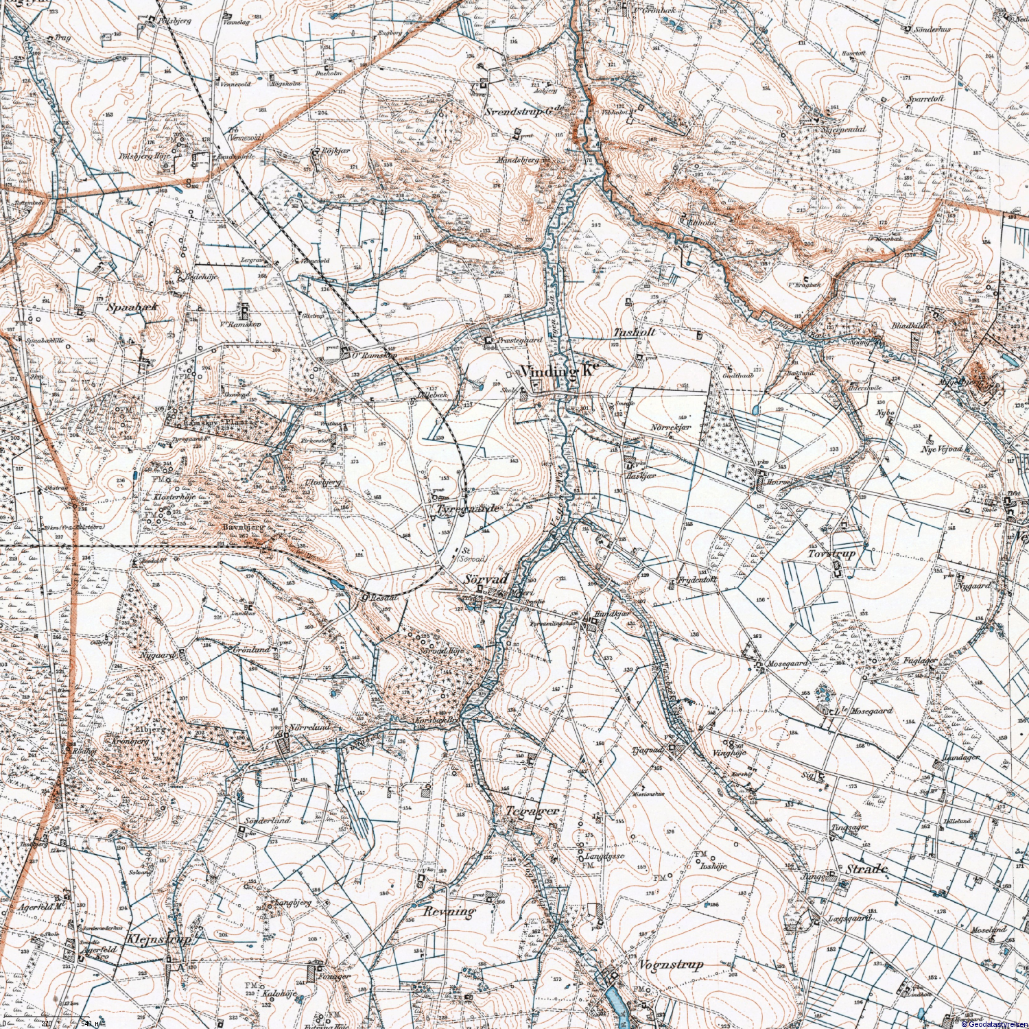 Udsnit af lavt målebordsblad i 1:20.000, målt 1901-1933